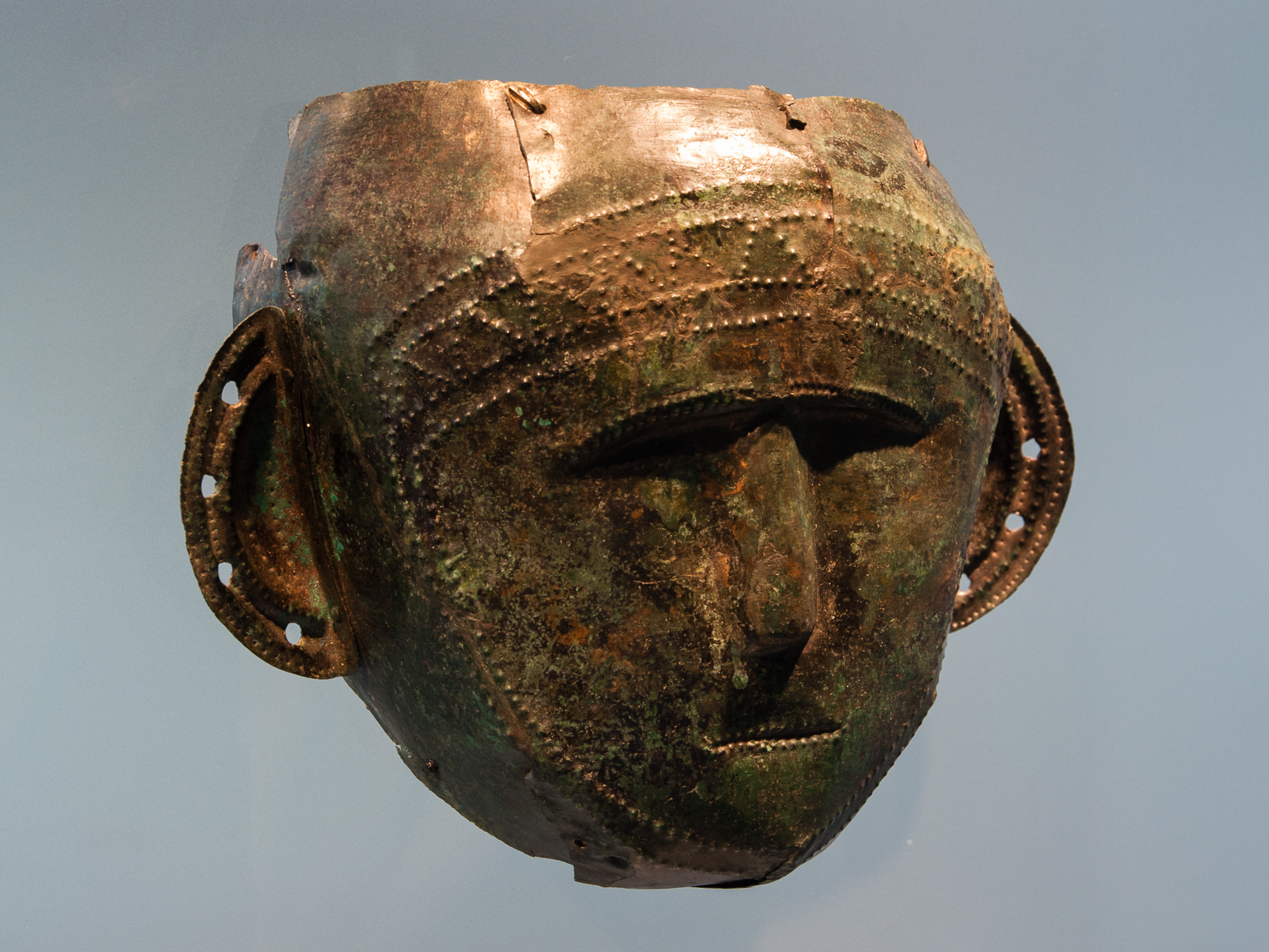 Bronzene Blechmaske aus Kleinklein bei Großklein, Österreich. Jüngere Hallstattzeit, 1. Drittel 6. Jh. v. Chr.